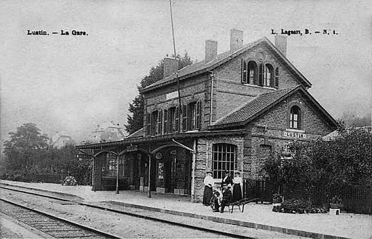 Intérieur de la gare vers 1900, avec la bâtiment voyageurs construit par la compagnie du Nord - Belge.